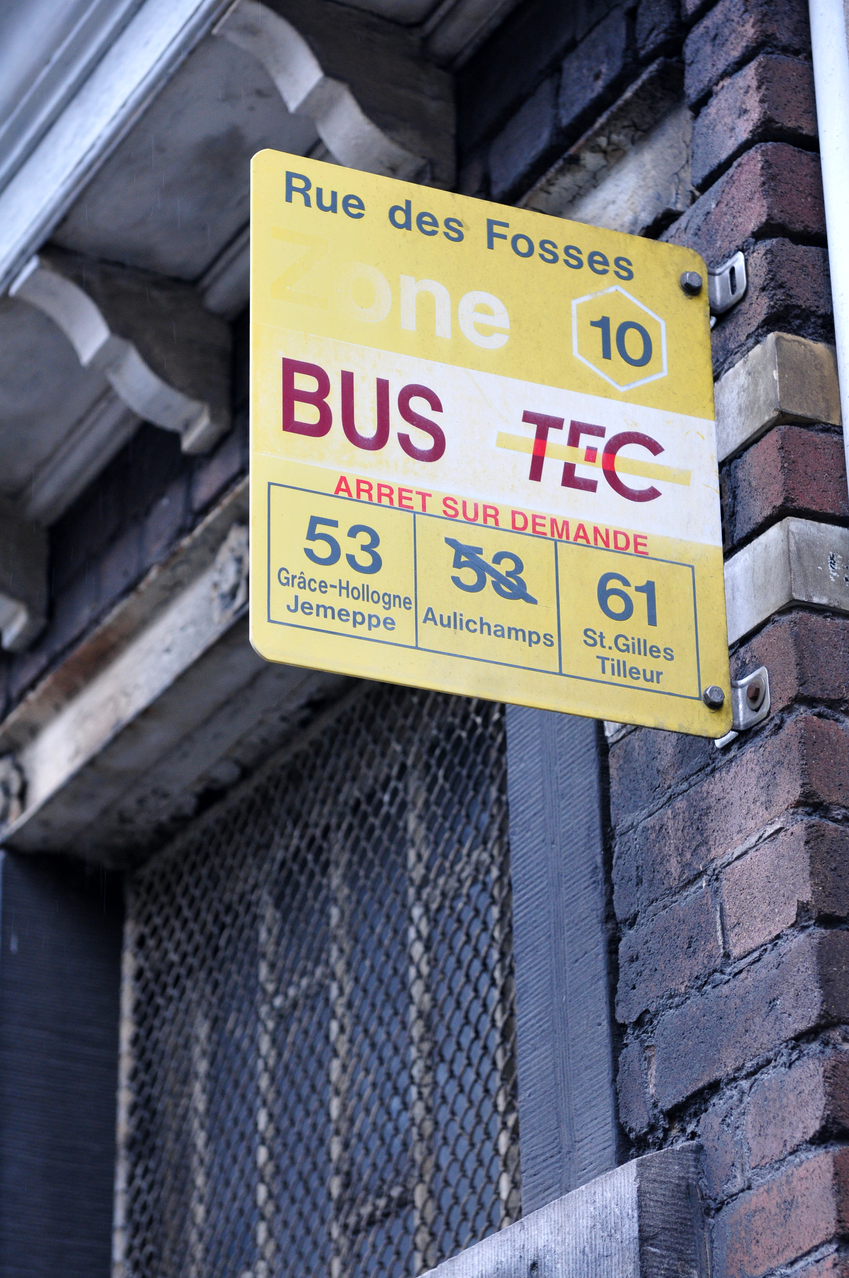 Lüttich